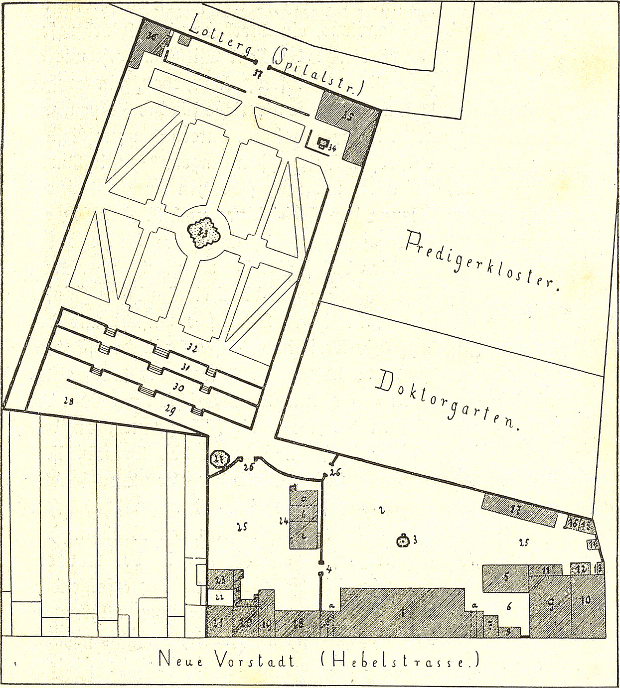 Grundplan der markgräflichen Hofliegenschaften (Markgräflerhof, Basel) nach der Aufnahme des Hofgärtners Koboldt (1740); Maßstab 1:2000